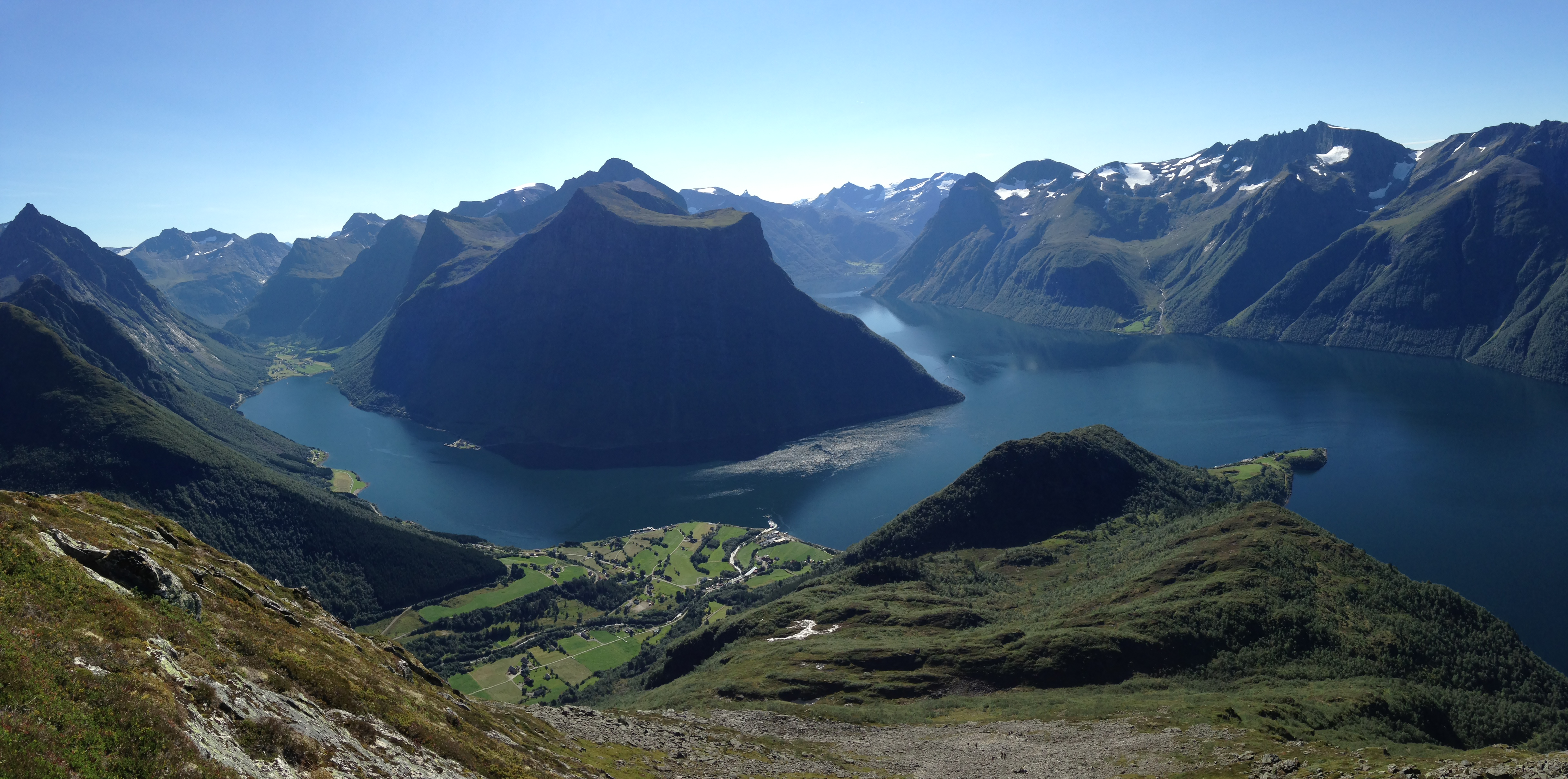 Utsikt fra Saksa